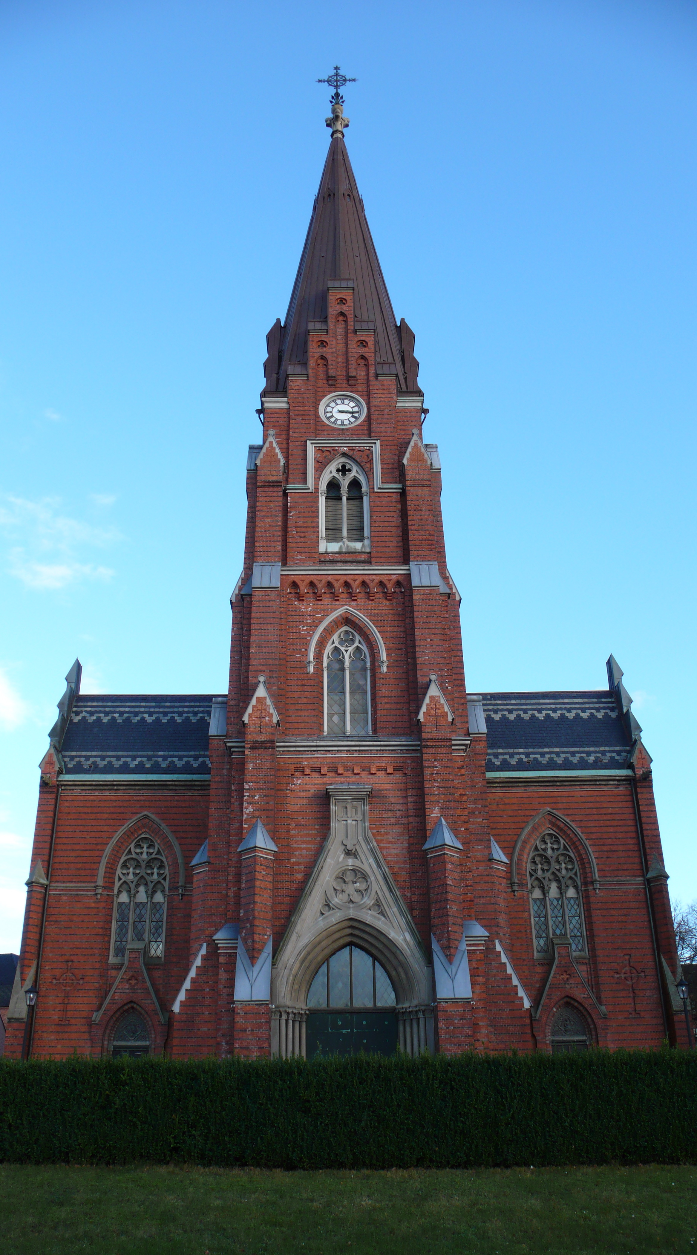 Allhelgonakyrkan in Lund von Vorne